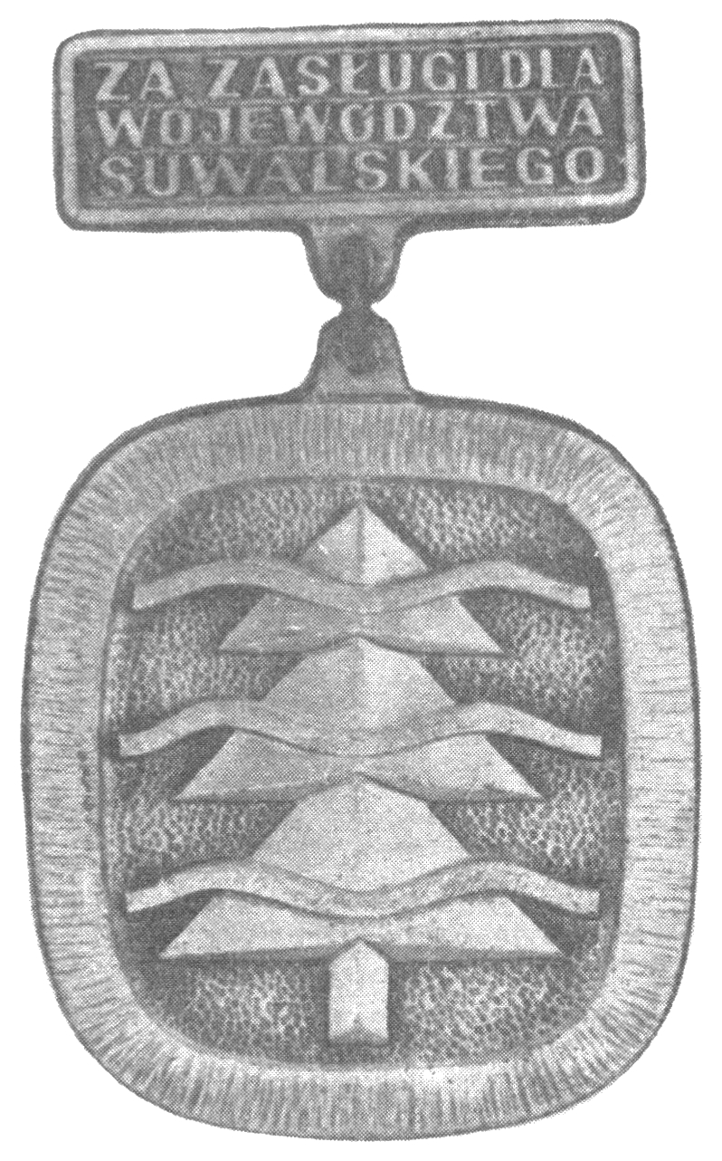 Odznaka „Za Zasługi dla Województwa Suwalskiego” (source: „Dziennik Urzędowy Wojewódzkiej Rady Narodowej w Suwałkach“. 1978, nr 6, s. 5)